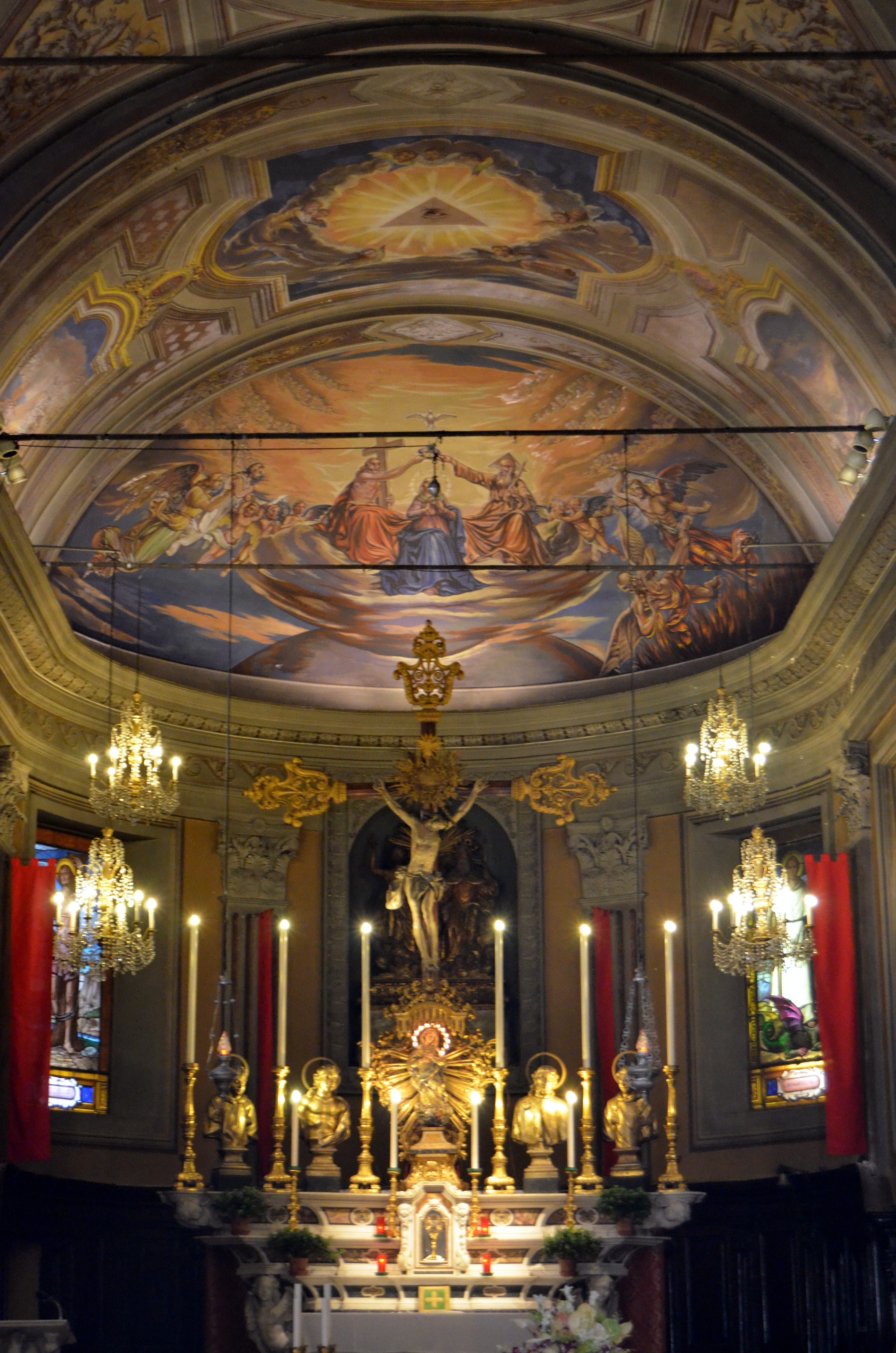 L'oratorio della Santissima Trinità (Lavagna), Liguria, Italia